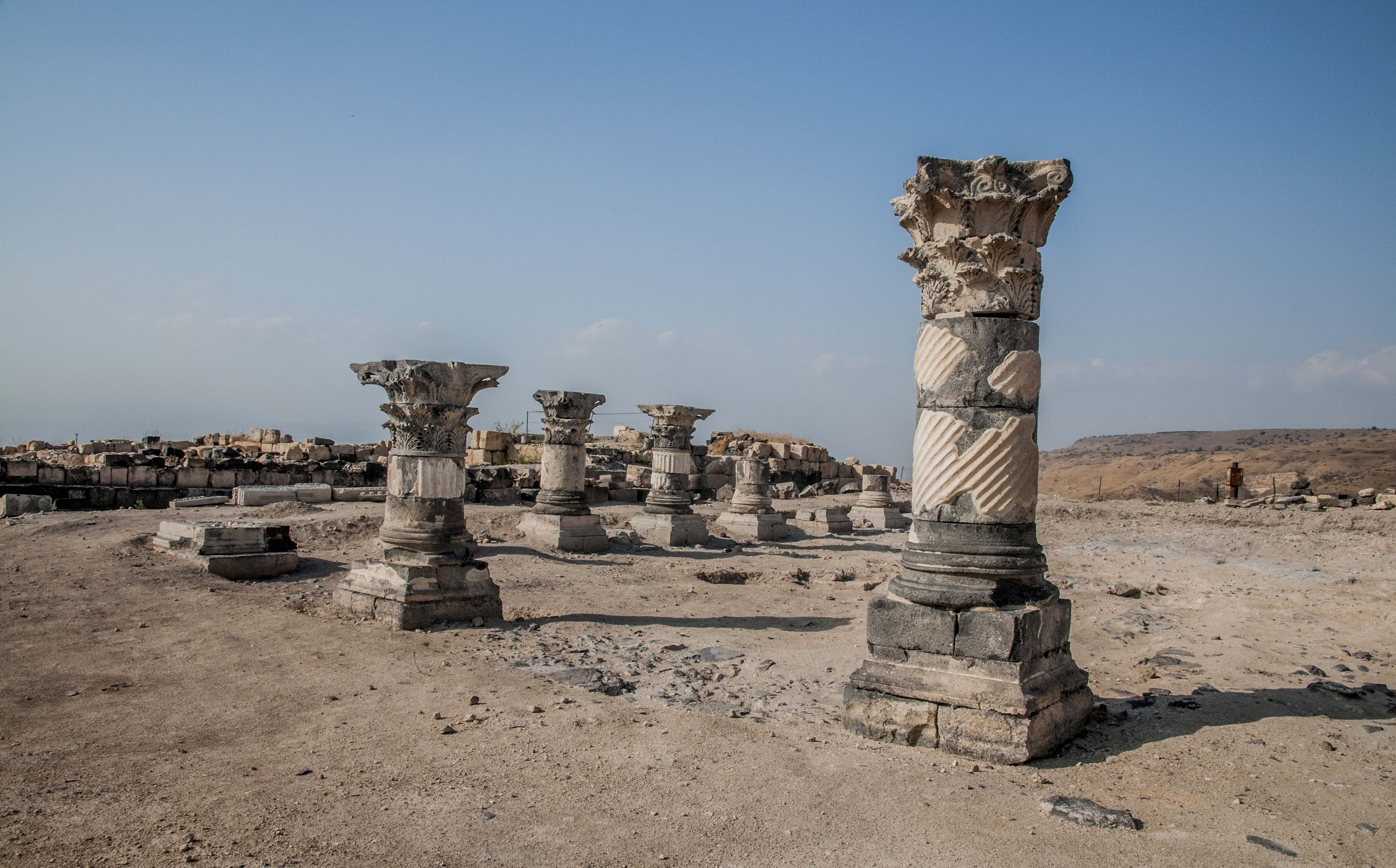 סוסיתא נוסדה כעיר מדינה (פוליס) ככל הנראה באמצע המאה ה-2 לפנה"ס בידי הממלכה הסלאוקית.